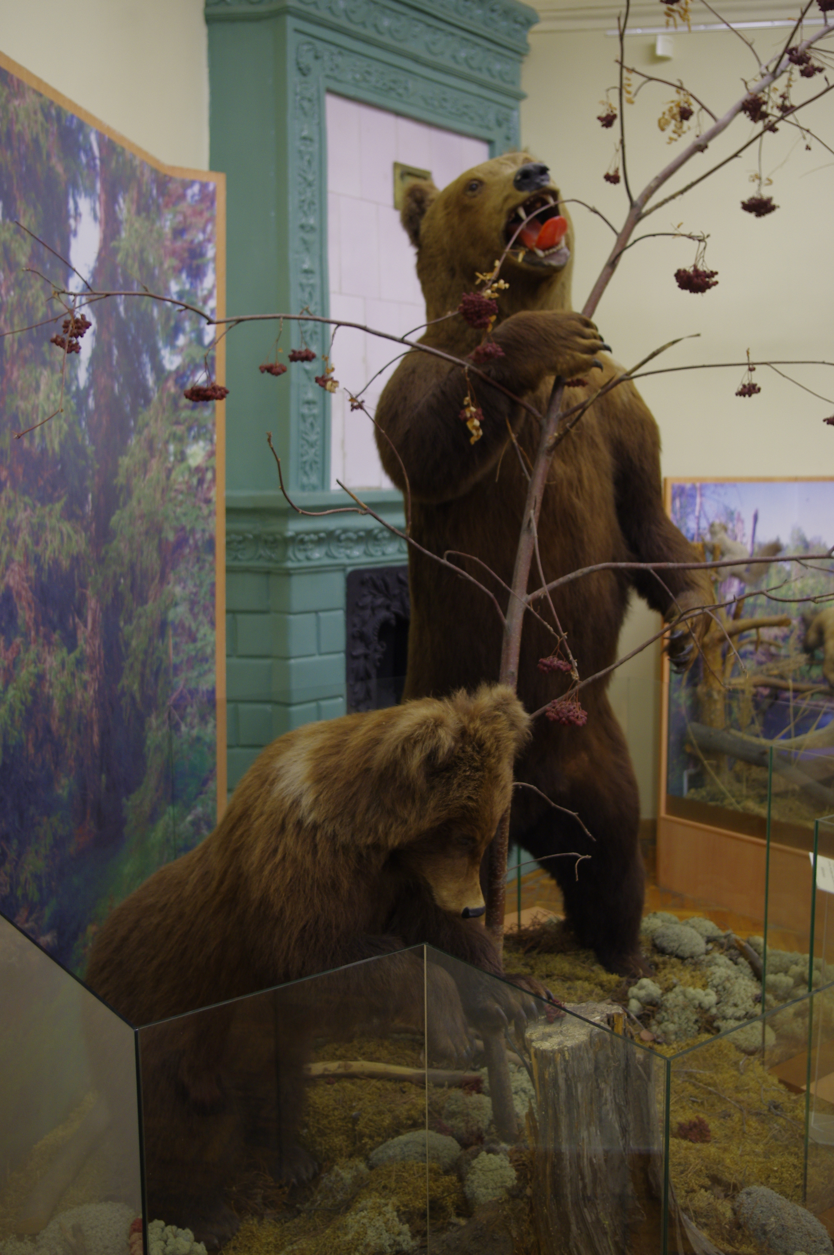 Lato 2013.